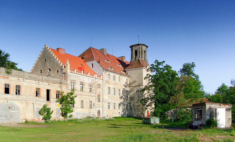 Zabytkowy zespół pałacowy (1 poł. XVIII, XIX) w Kunowie, powiat zgorzelecki. A/5408/1905